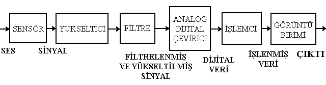 Stetoskop